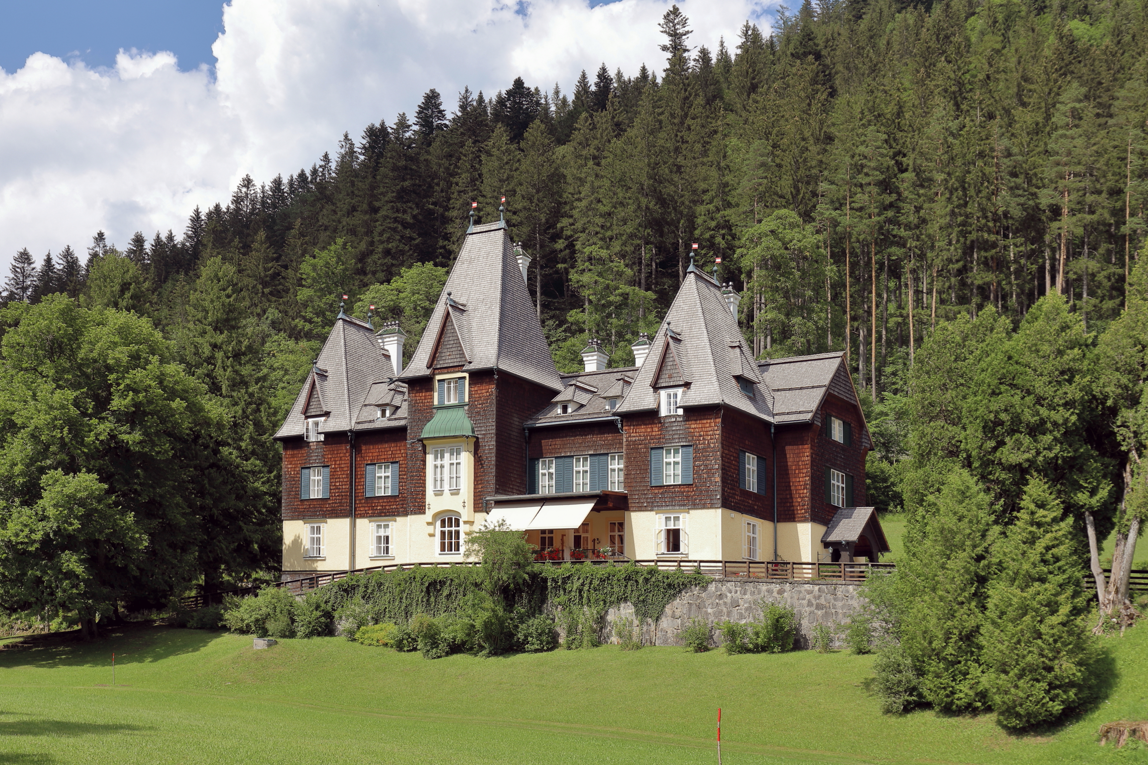 Das Jagdschloss bzw. die Präsidentenvilla in Mürzsteg, ein Ortsteil der steiermärkischen Marktgemeinde Neuberg an der Mürz.Das am Hang des Lanauberges zweigeschossiges, stark gegliedertes Gebäude wurde ursprünglich 1869 als kleines Jagdhaus für Kaiser Franz Josef errichtet und mehrfach um- bzw. ausgebaut (zuletzt 1903). Nach nach dem Ersten Weltkrieg wurde das Jagdschloss dem Kriegsgeschädigtenfonds übertragen, obwohl es nie Staatsbesitz sondern habsburgisches Privateigentum war. 1921 wurde das Schloss für öffentliche Besichtigungen freigegeben. Um den Nahrungsmittelmangel unmittelbar nach dem Ersten, aber auch nach dem Zweiten Weltkrieg zu lindern, wurde damals der Park der örtlichen Bevölkerung zum Gemüseanbau zur Verfügung gestellt. Einzelne Zimmer des Schlosses wurden an Feriengäste vermietet. In Jänner 1938 erfolgte die Restitution an Otto Habsburg, jedoch wurde es von den Nationalsozialisten wieder beschlagnahmt und dient seit 1947 als Sommersitz der österreichischen Bundespräsidenten.